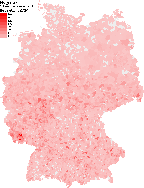 Verteilung des Nachnamens Wagner in Deutschland nach dem Telefonbuch mit Stand vom 6. Januar 2005 Source: selbst erstellt Ersteller: W. Baumgartner